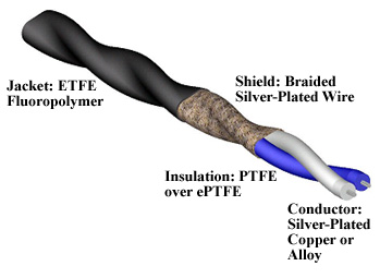 Монгол: Мушгиа хос